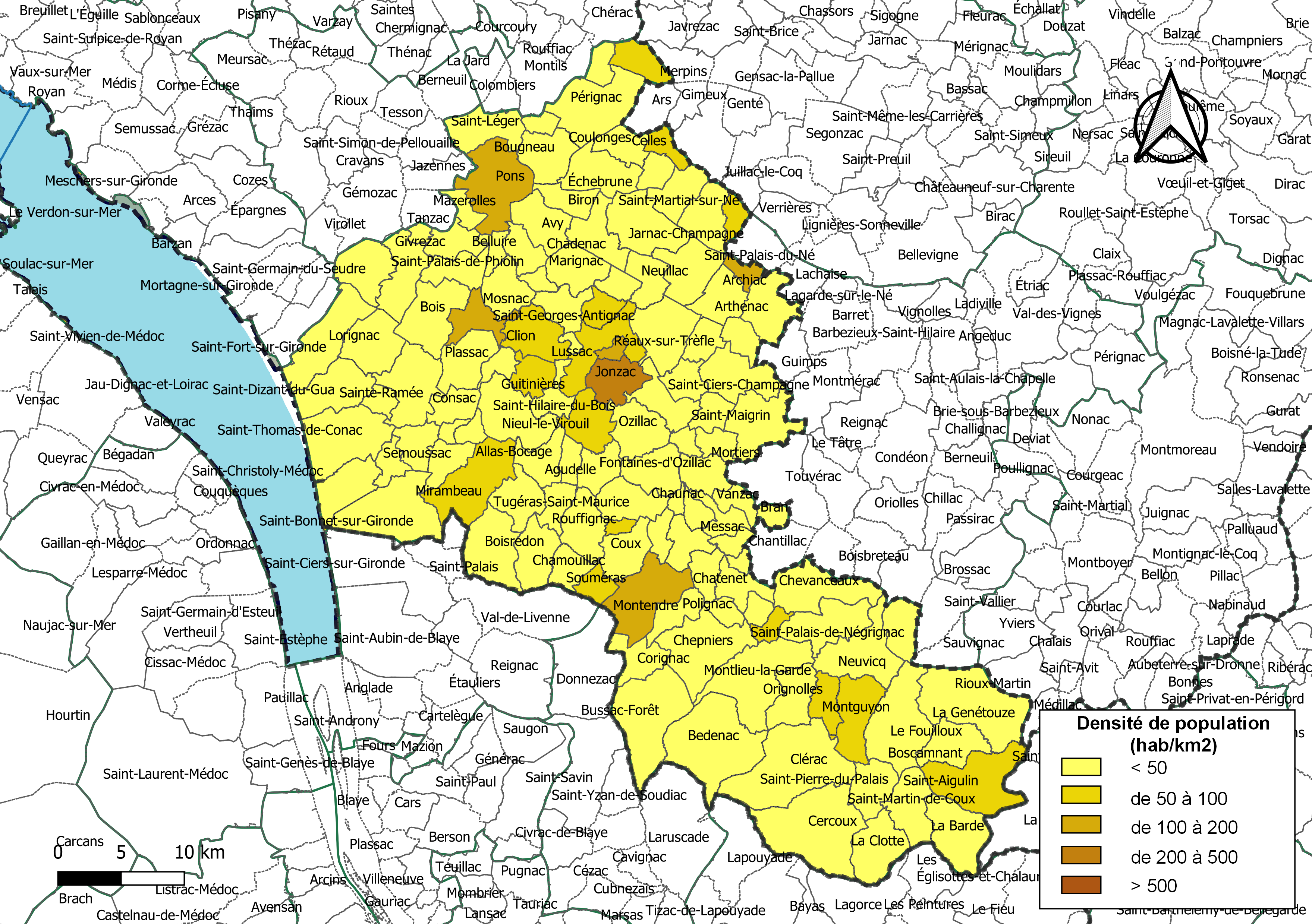 Carte des densités de population (millésimée 2016) des communes de la communauté de communes la Communauté de communes de la Haute Saintonge, département de la Charente-Maritime, France. Composition au 1er janvier 2019.